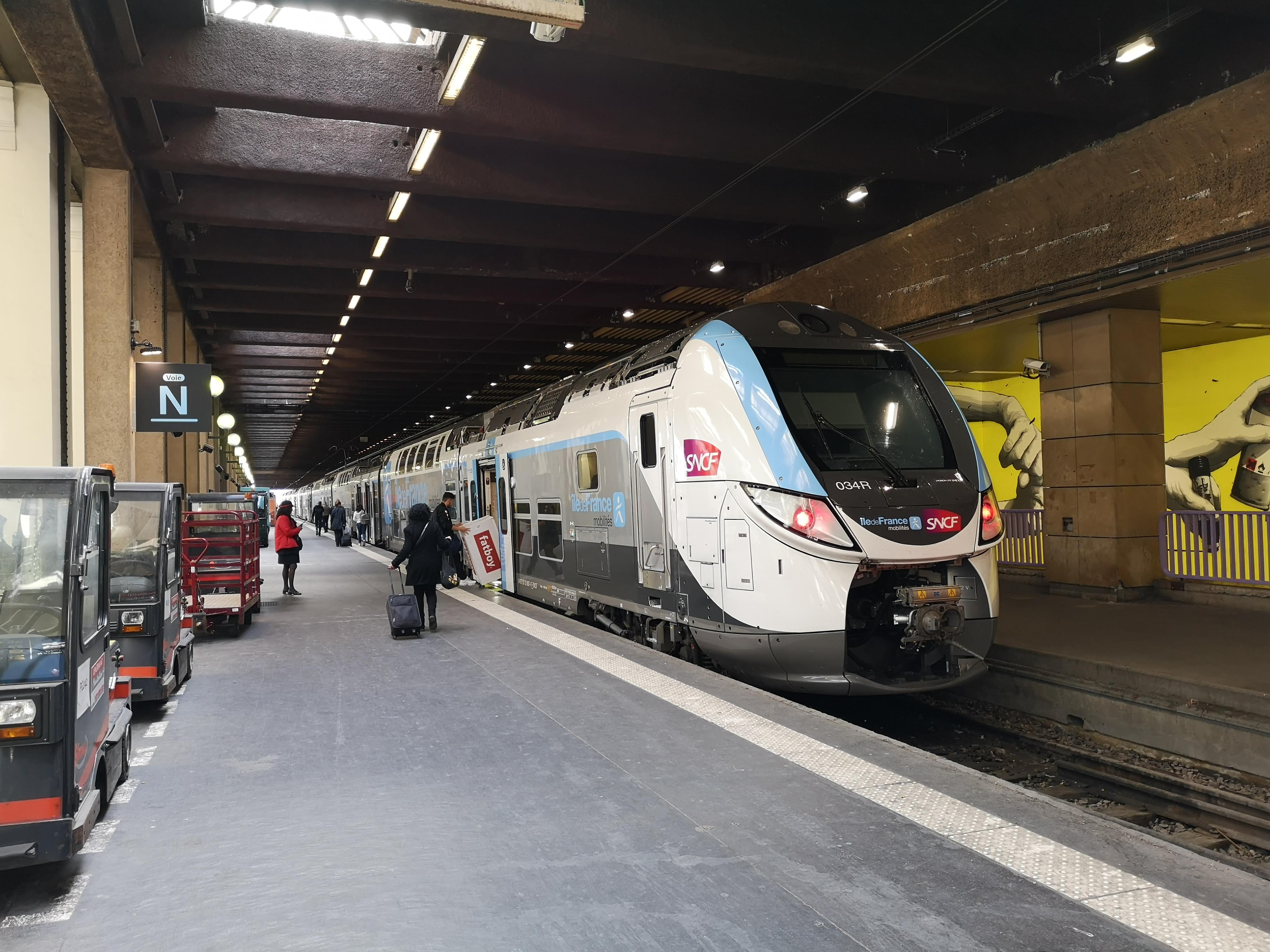 UnTrain Z 57000 de la ligne R Transilien stationné à Gare de Lyon, Paris.